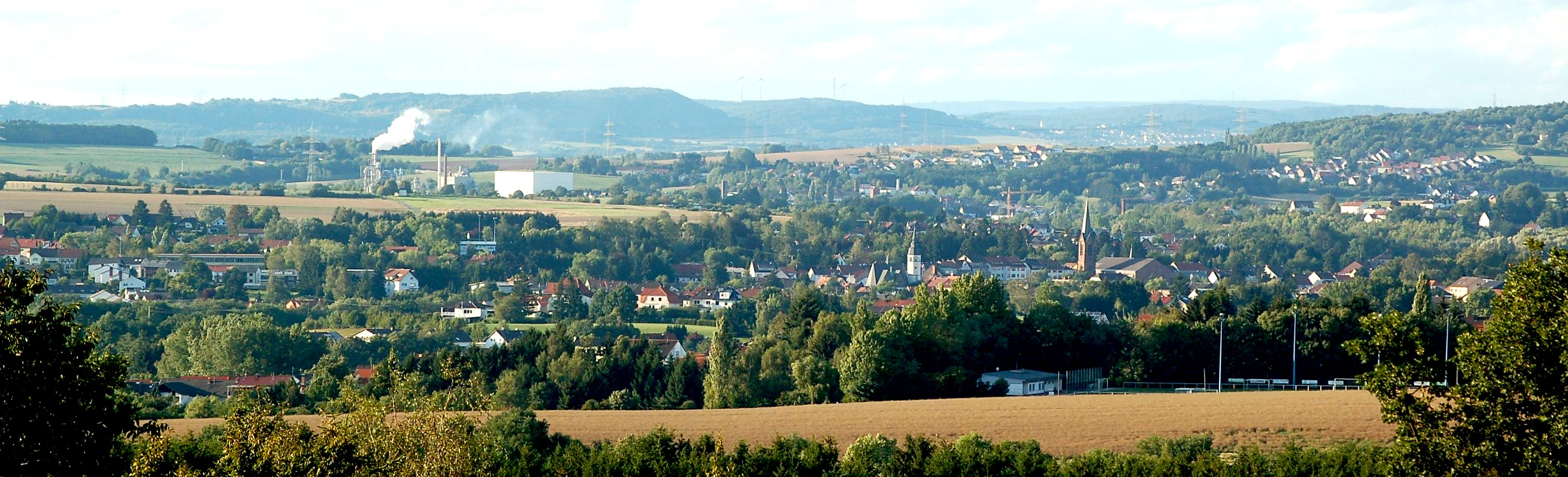 Blick vom Hixberg nach Norden ins obere Köllertal: Über dem Walpershofer Sportplatz am Kurzenberg sind die beiden Kirchen in der Ortsmitte von Heusweiler zu sehen; dazwischen, etwas weiter im Hintergrund, ein Baukran am Eisenbahnviadukt in Eiweiler. Dort befindet sich auch das Werk der Glunz AG, dessen Rauchfahne links zu sehen ist.